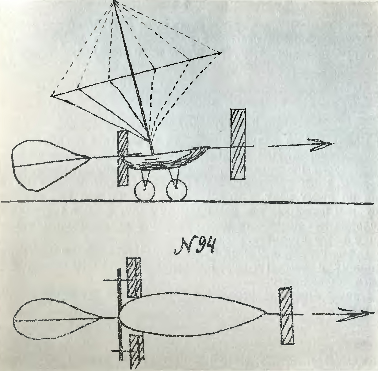 Изображение одной из летающих моделей самолёта, изготовленных А. Ф. Можайским